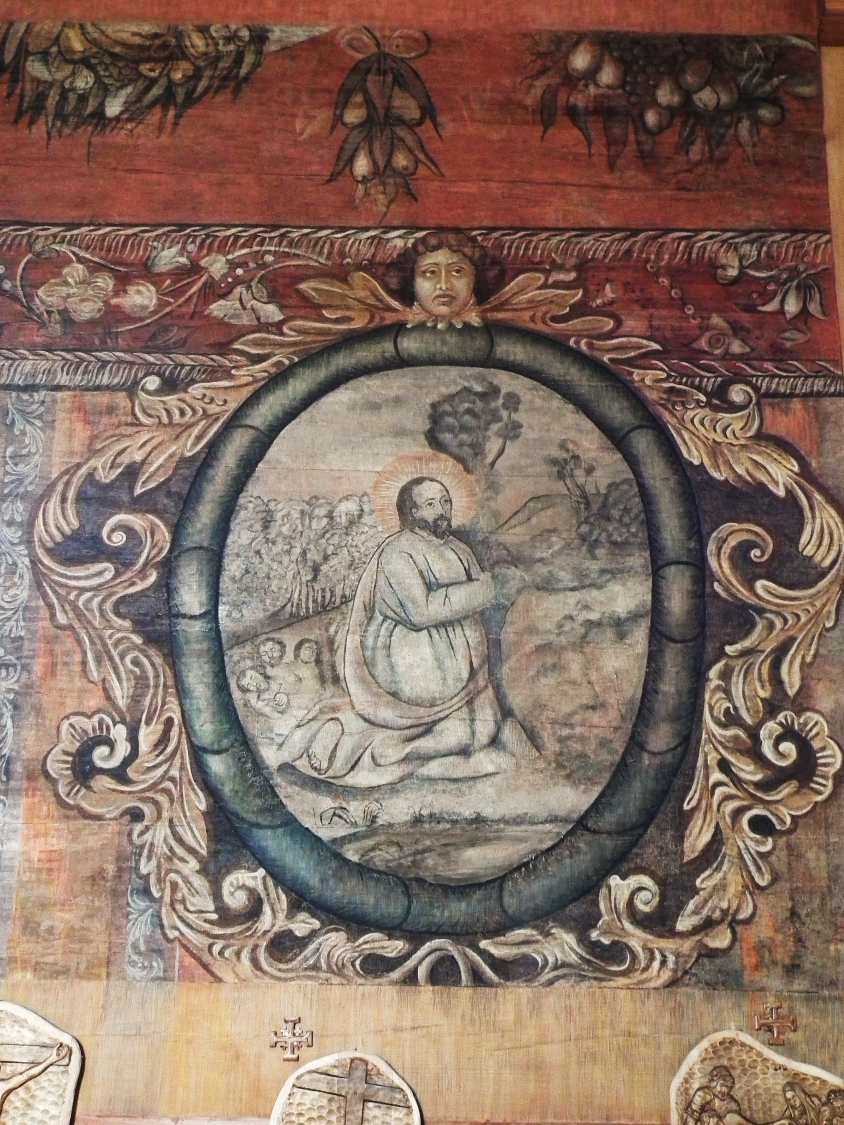 Kościół Podw. Krzyża Św. w Żołędowie.